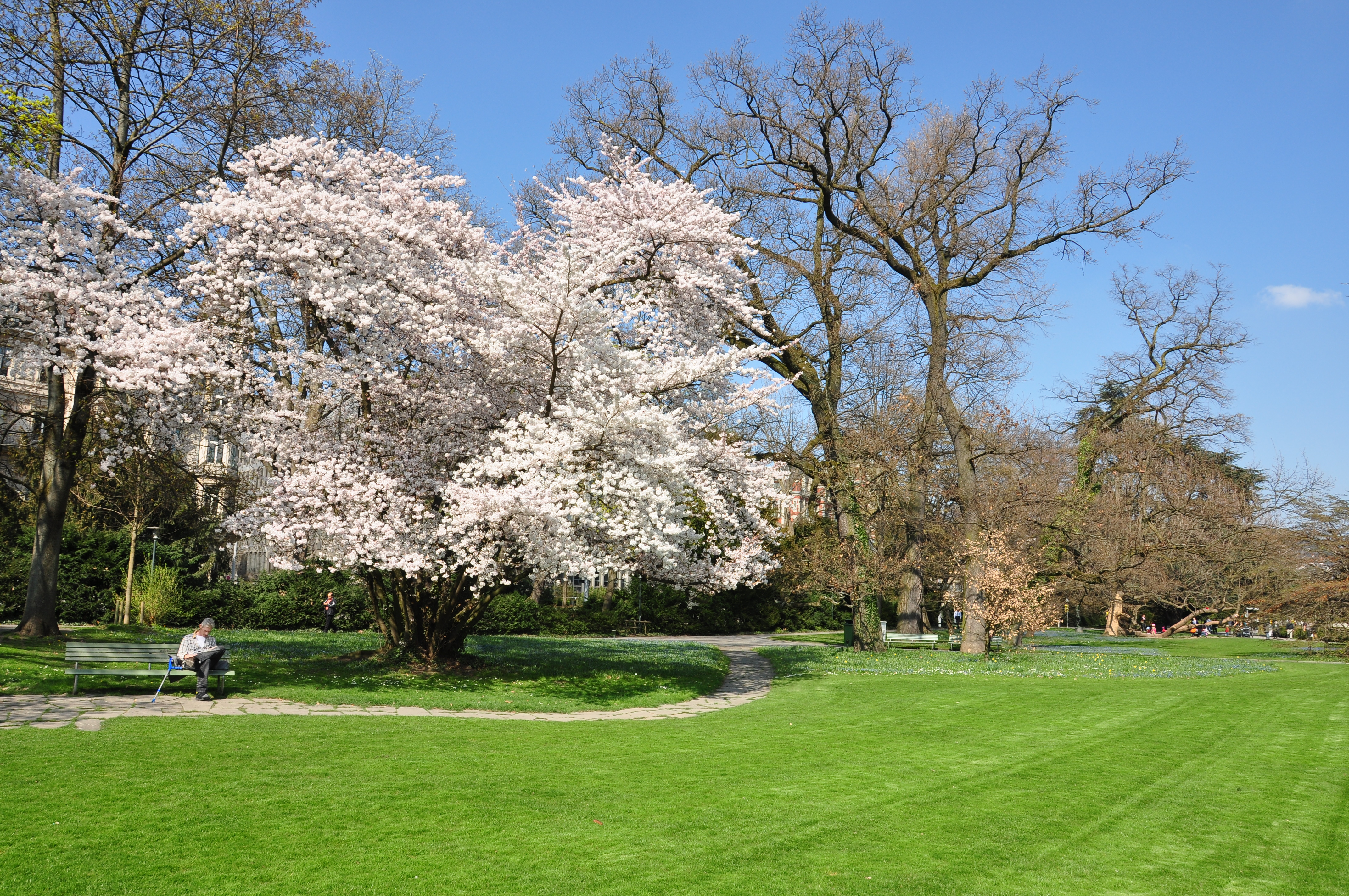 Arboretum in Zürich-Enge (Switzerland)